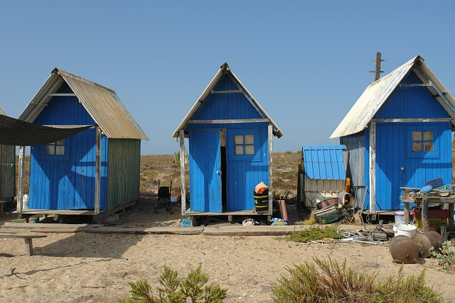 Ilha da Barreta, Algarve, Portugal